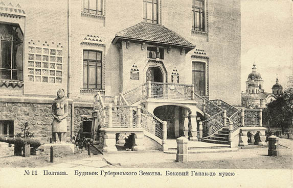 Будинок Полтавського губернського земства. Боковий ґанок. Видання паперового магазину І. А. Дохмана